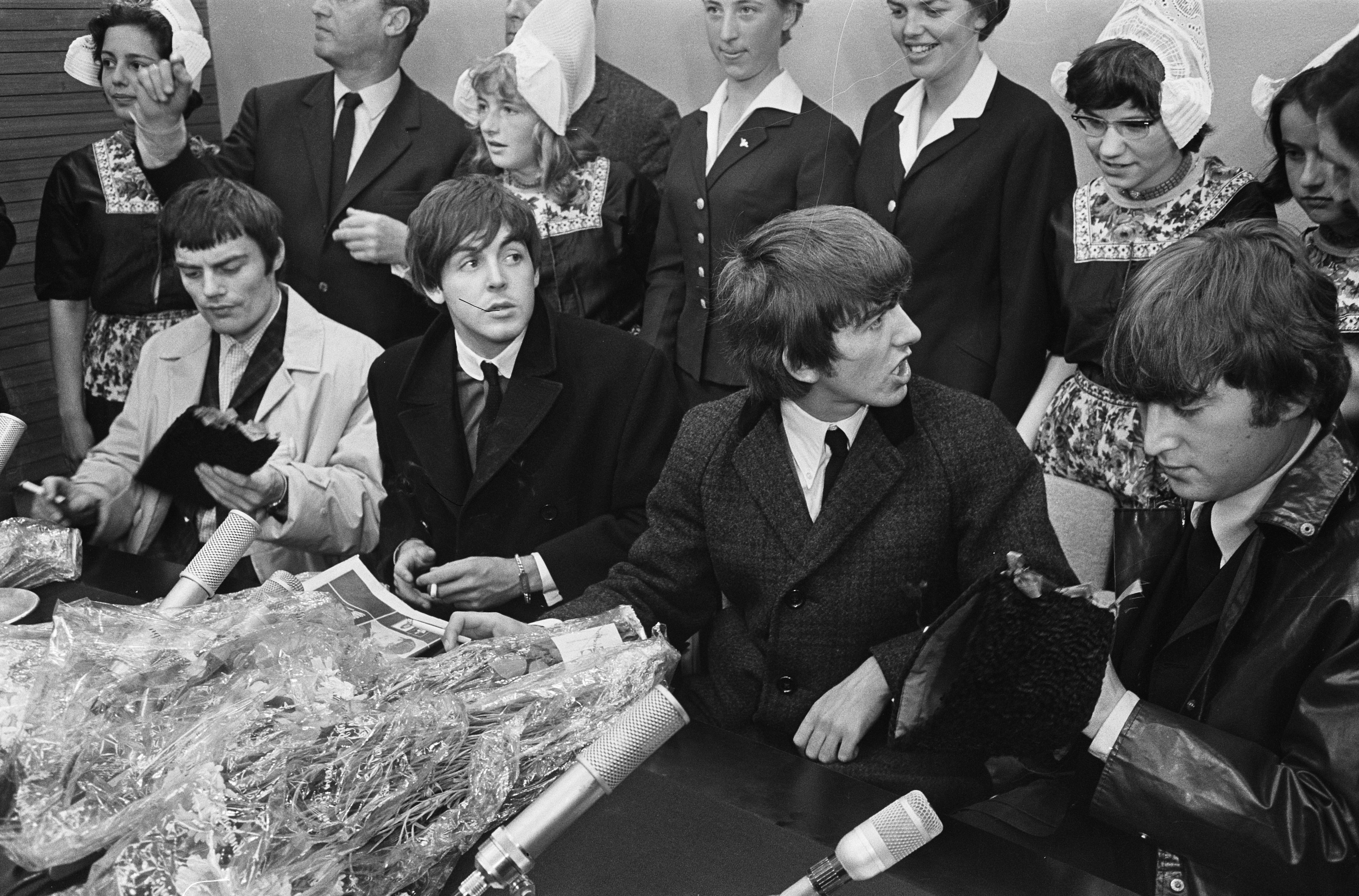 Collectie / Archief : Fotocollectie Anefo Reportage / Serie : [ onbekend ] Beschrijving : Aankomst Beatles op Schiphol, de Beatles tijdens persconferentie. Vlnr Jimmy Nicol, vervanger van Ringo Starr, Paul McCartney, George Harrison, John Lennon Datum : 5 juni 1964 Locatie : Noord-Holland, Schiphol Trefwoorden : muziek, persconferenties, popgroepen Persoonsnaam : Harrison George, Lennon, John, Mccartney Paul, Nicol Jimmy Instellingsnaam : Beatles Fotograaf : Pot, Harry / Anefo Auteursrechthebbende : Nationaal Archief Materiaalsoort : Negatief (zwart/wit) Nummer archiefinventaris : bekijk toegang 2.24.01.05 Bestanddeelnummer : 916-5130